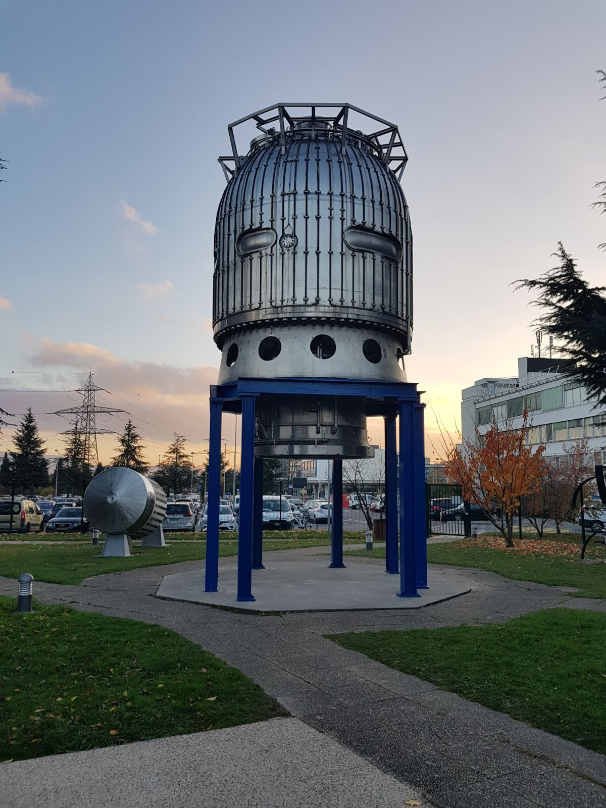 תמונה של גלאי החלקיקים בסרן, שוויץ